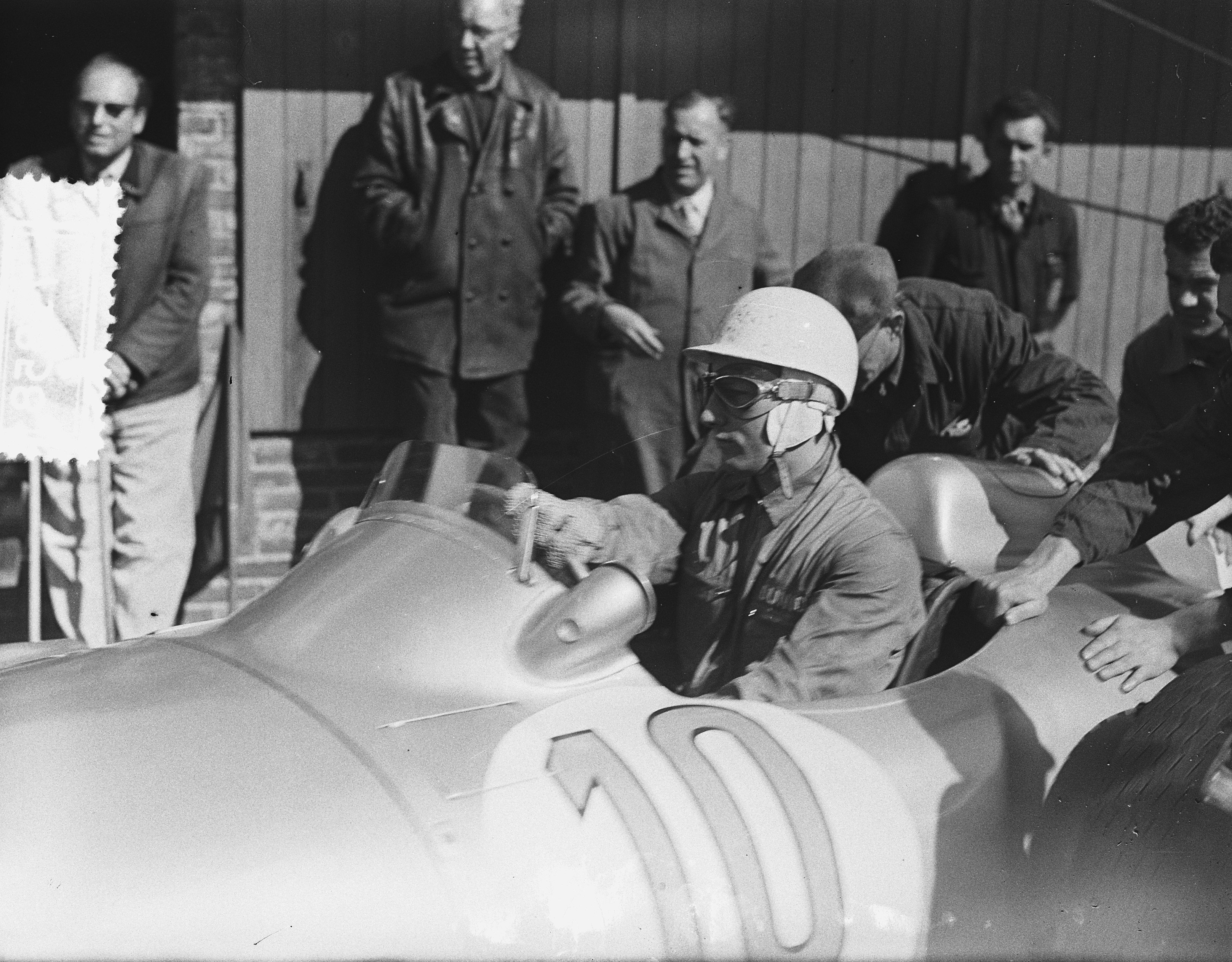 Stirling Moss lors du Grand Prix des Pays-Bas 1955 sur Mercedes-Benz W196.